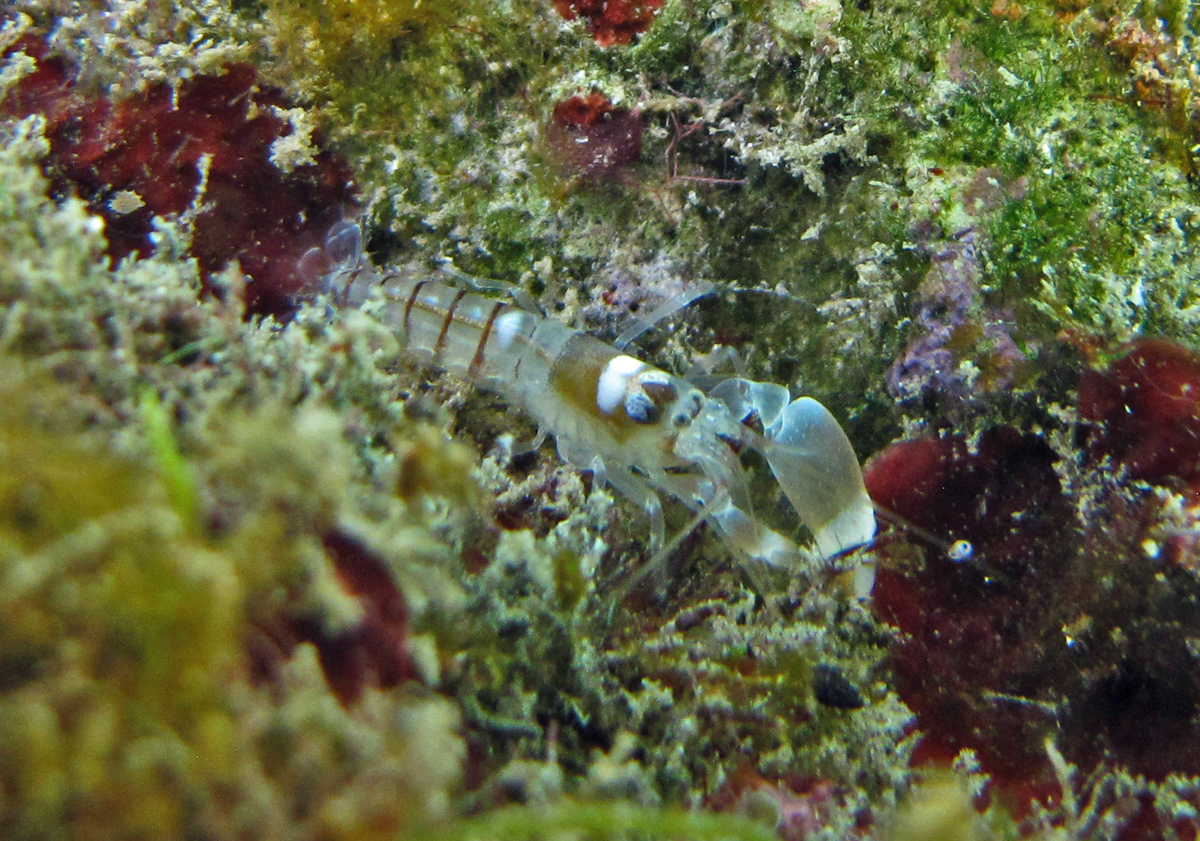 Alpheus dolerus à la Réunion.